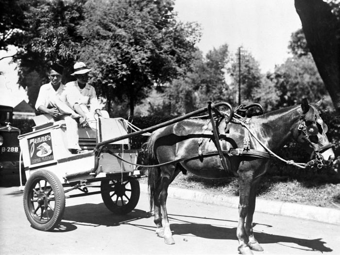 Repronegatief. Bestelwagen Jenne & Co. Batavia